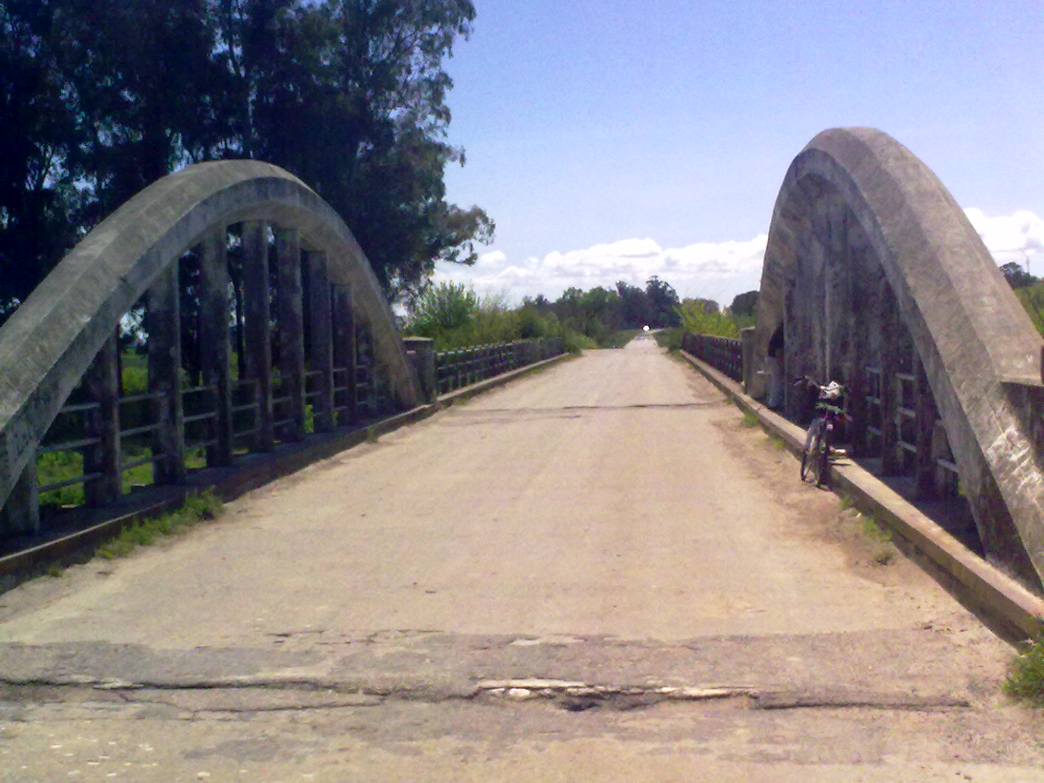 Puente de la antigua traza de la ruta 2 en el Canal 9 al norte de la ciudad de Dolores, provincia de Buenos Aires, Argentina.